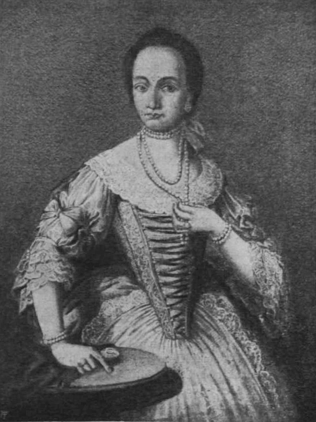 Sibrik Antalné felsőeőri Bertha Klára (1748-1772)